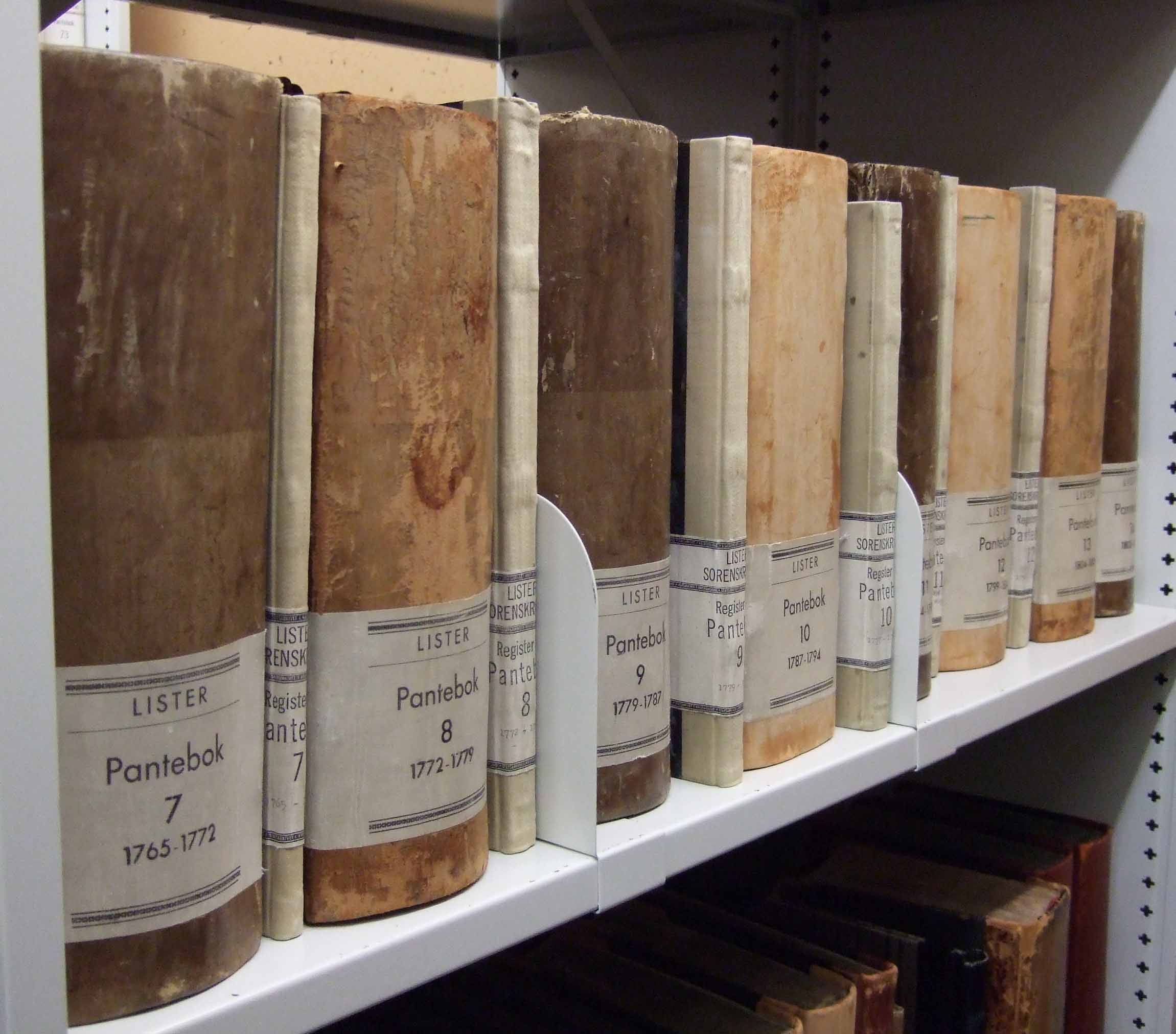 Pantebøker, Lister sorenskriverembede.